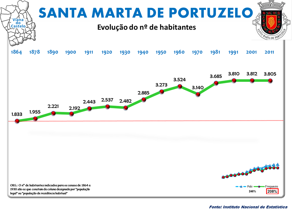 Censos 1864/2011